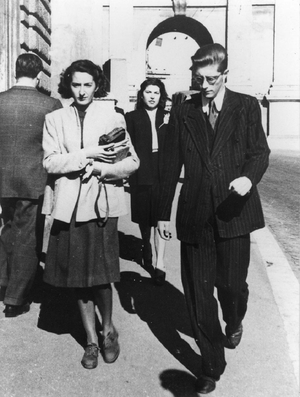 politico, politologo e filoso italiano